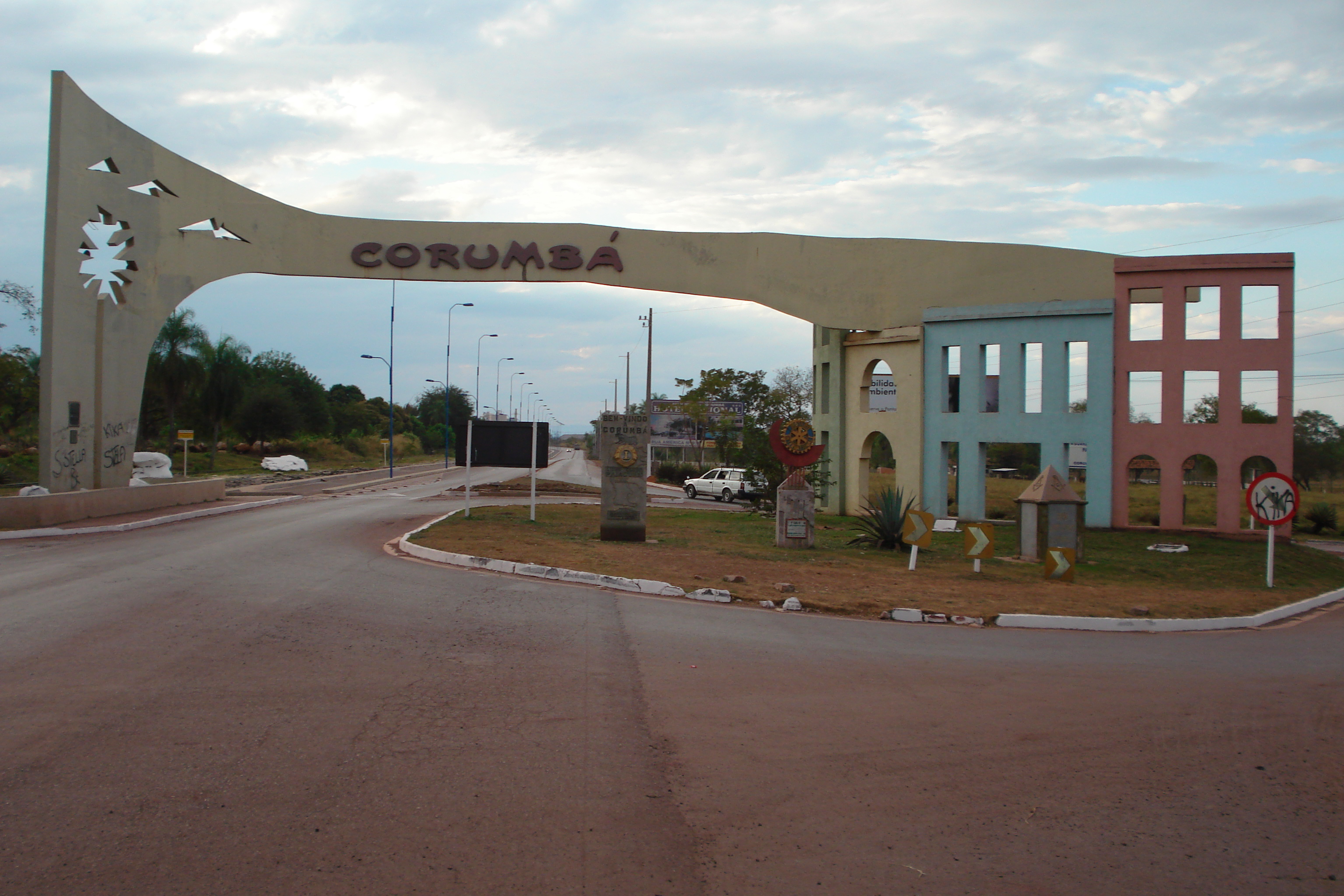 Portal de entrada da cidade de Corumbá